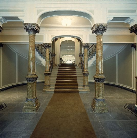 Hotelli Kämpin alkuperäinen portaikko 1960-luvun alkupuolella, ennen kuin rakennus purettiin.